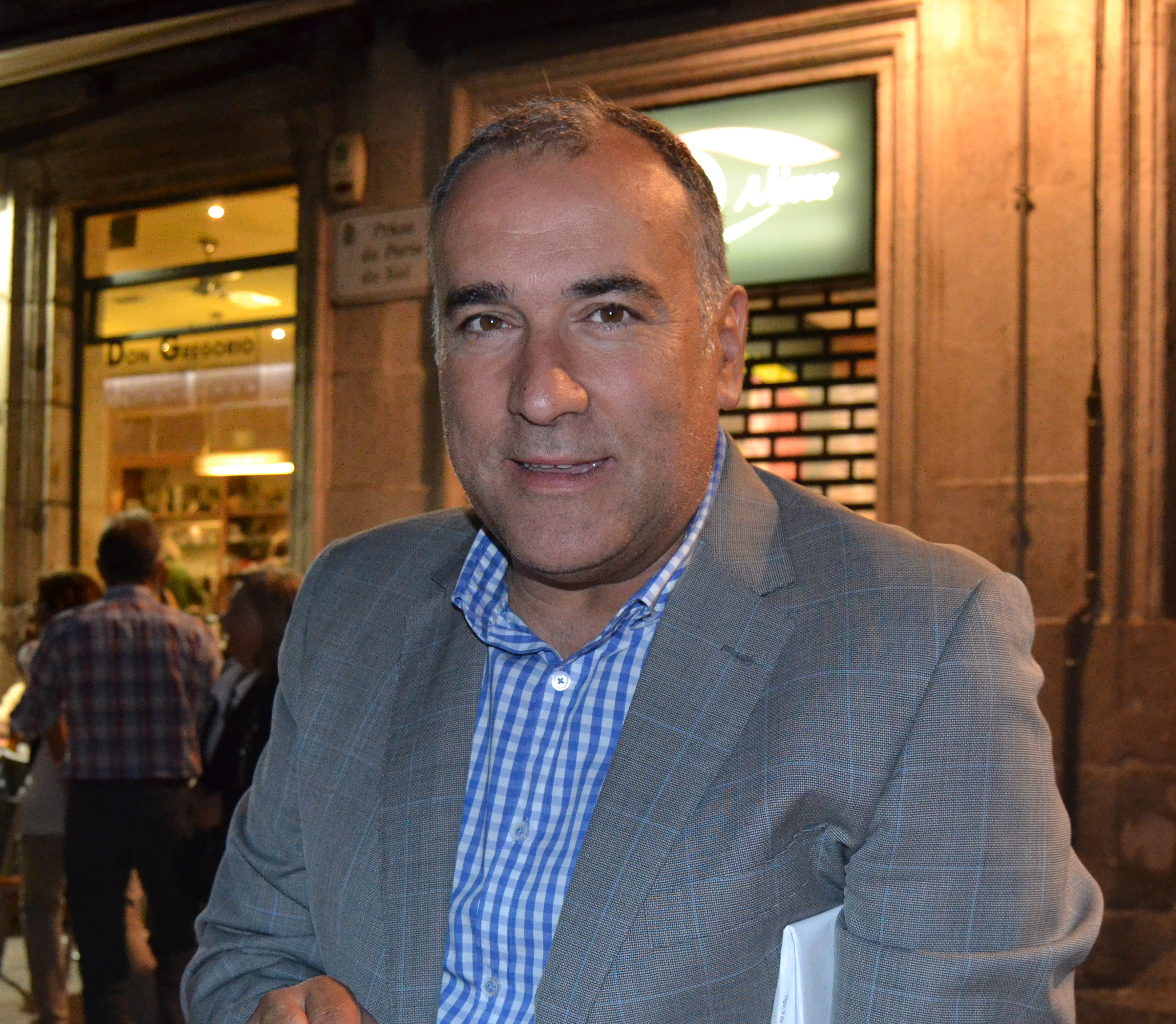 Xabier Fortes na manifestación contra a privatización do novo hospital de Vigo, o Álvaro Cunqueiro.